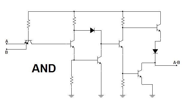 Puerta AND con transistores